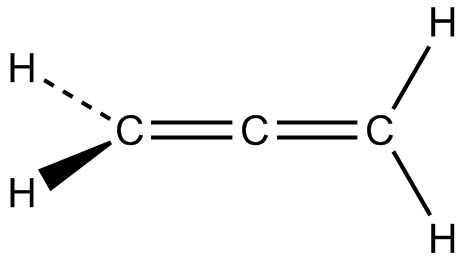 丙二烯